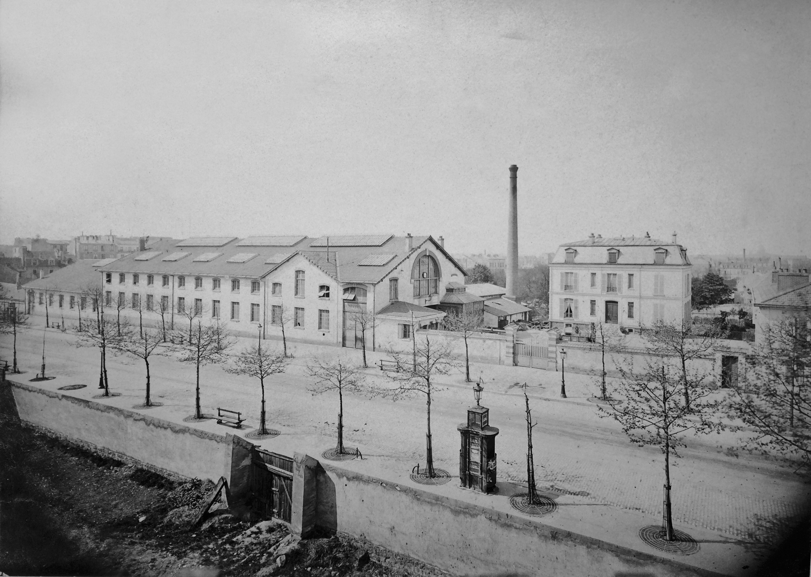 Cliché de l'entreprise L.Corpet (constructeur) : avec les ateliers (mis en service en 1870) et la maison bourgeoise domicile de Lucien Corpet. Au premier plan l'avenue Philippe Auguste. Derrière la maison on aperçoit le parc et un pavillon de l'ancienne pension Belhomme. Les ateliers et la maison ont été détruits et remplacés par des immeubles d'habitation dans les années 1970.